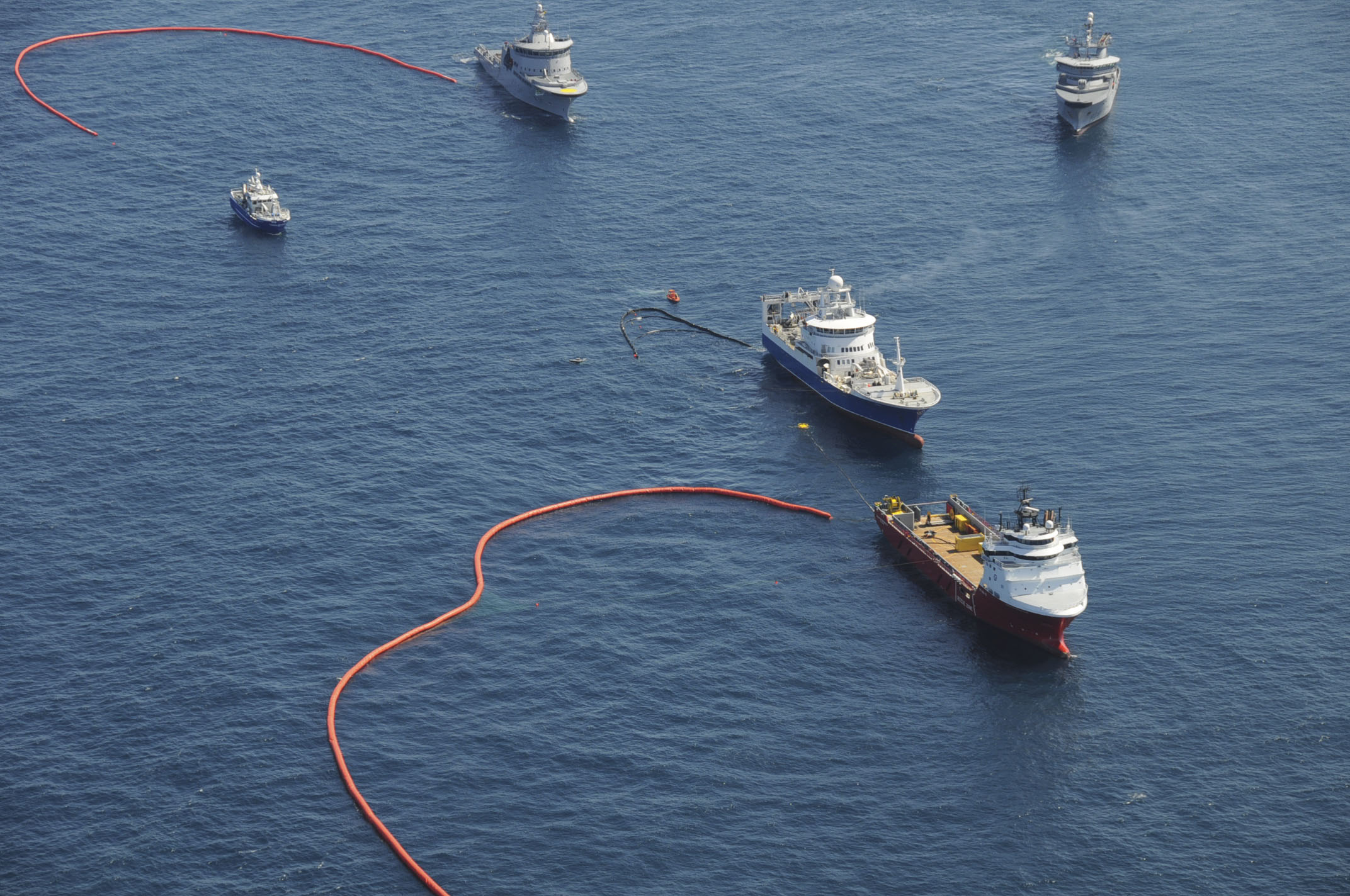 Oljeindustrien tester nytt oljevernutstyr under reelle forhold i Nordsjøen. Om lag 100 kubikkmeter olje slippes ut på havet, for så å bli samlet opp igjen. I øvelsen deltok blant annet fartøyene KV Bergen, KV Harstad, fiskefartøyet Libas og Voldstad Princess fra NOFO-poolen. Foto: NOFO